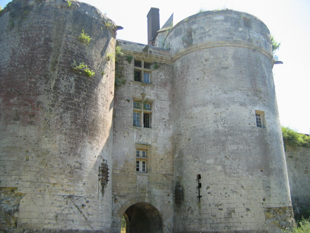 Château de Tancarville, Tancarville, Seine-Maritime, France